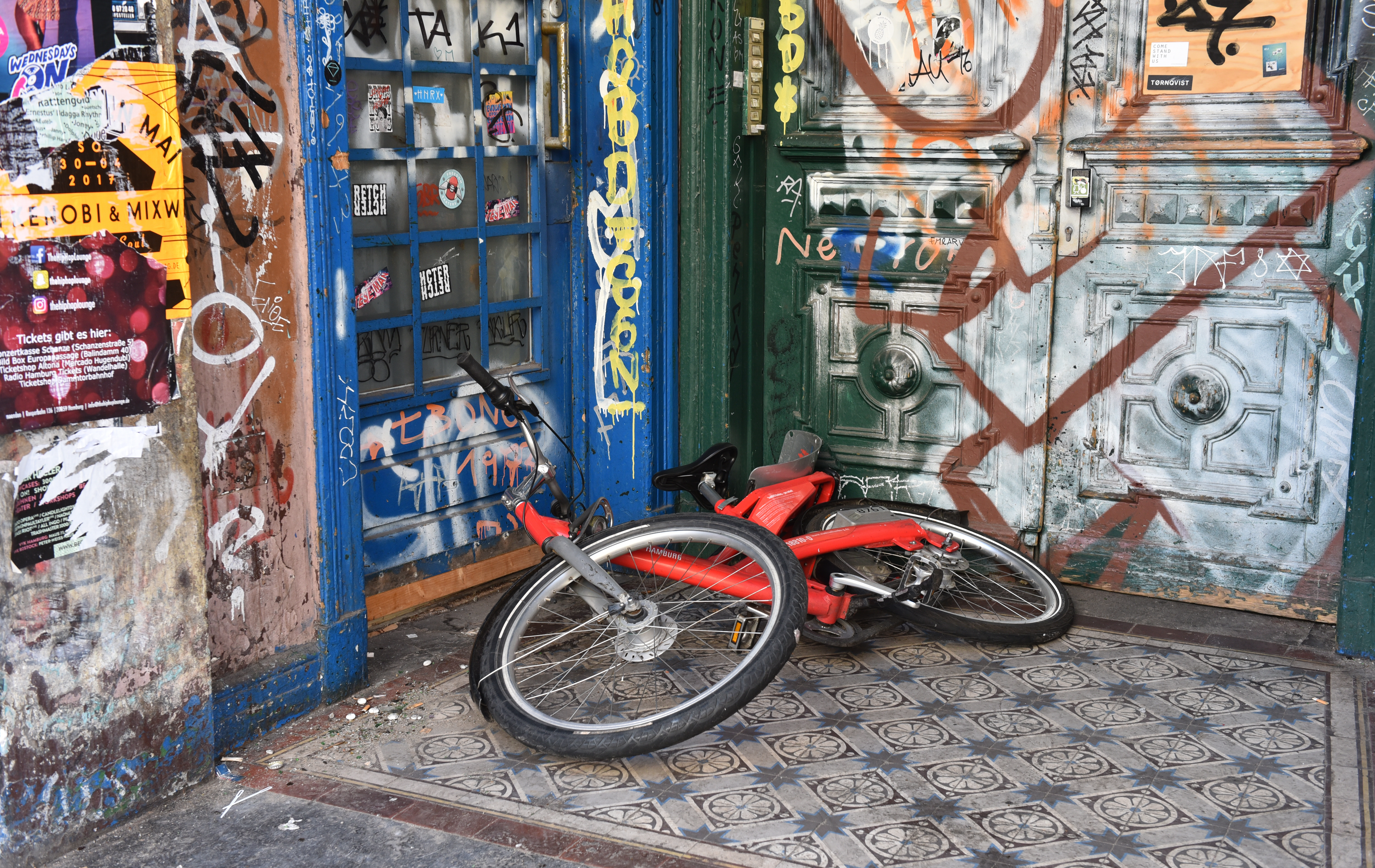 G-20 Inpressionen aus der Straße Schulterbatt nach der dritten Kravallnacht